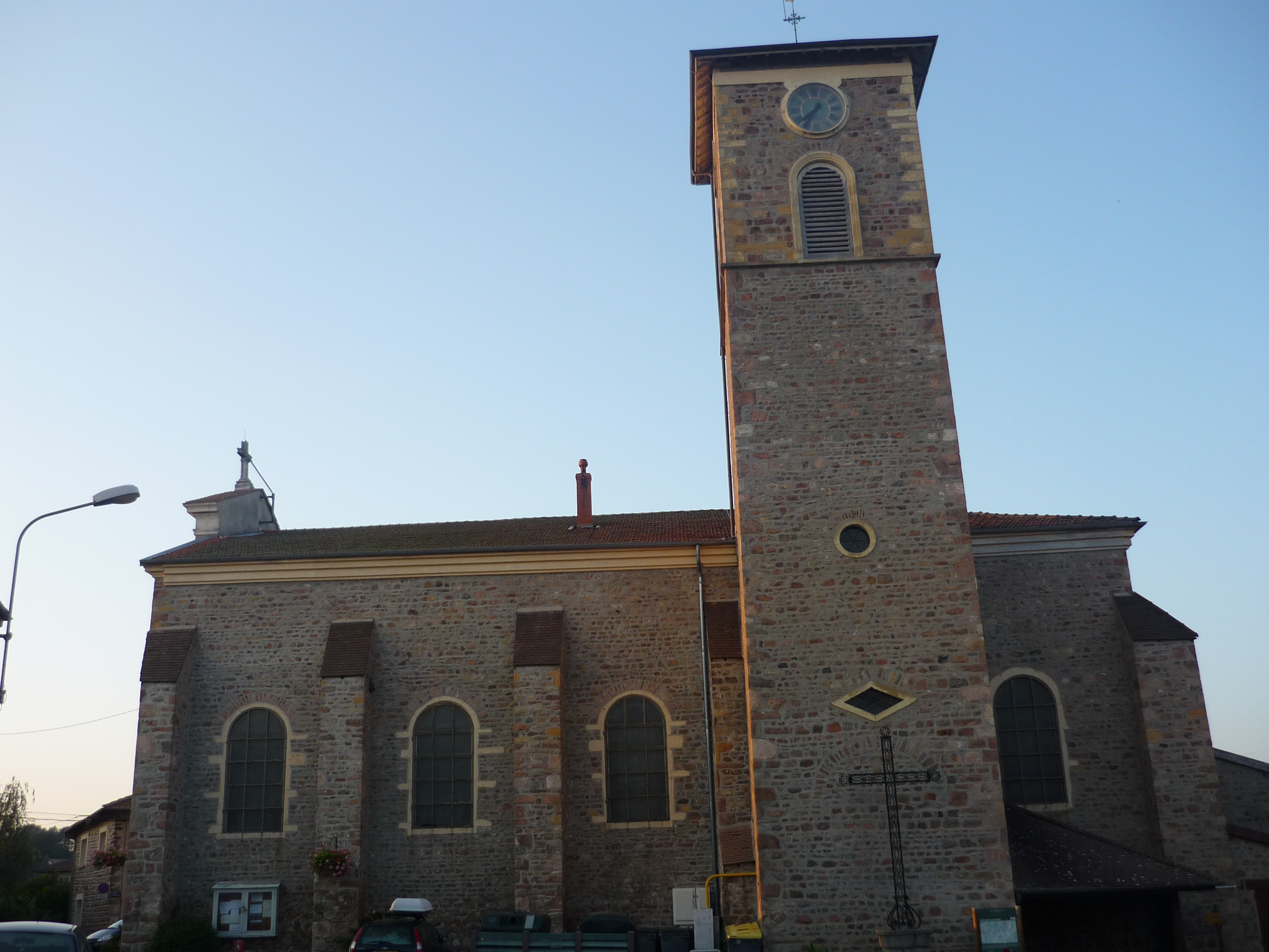 Église de Saint-Jean-la-Bussière